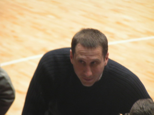 דייויד בלאט, היה מאמן מכבי ת"א